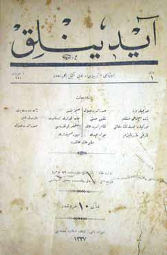 Aydınlık’ın ilk sayısı, 1 Haziran 1921.